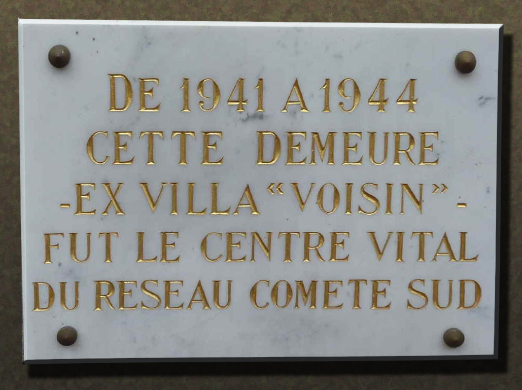 Photographie de la plaque commémorative sur la Villa Voisin à Anglet qui fut une des étapes du Réseau Comète de 1941 à 1944 avant le passage des Pyrénées.